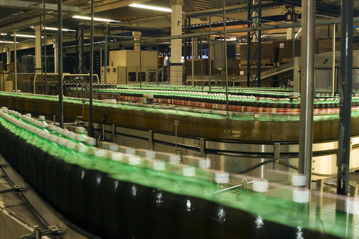 Produção Fábrica Refrigerantes Convenção